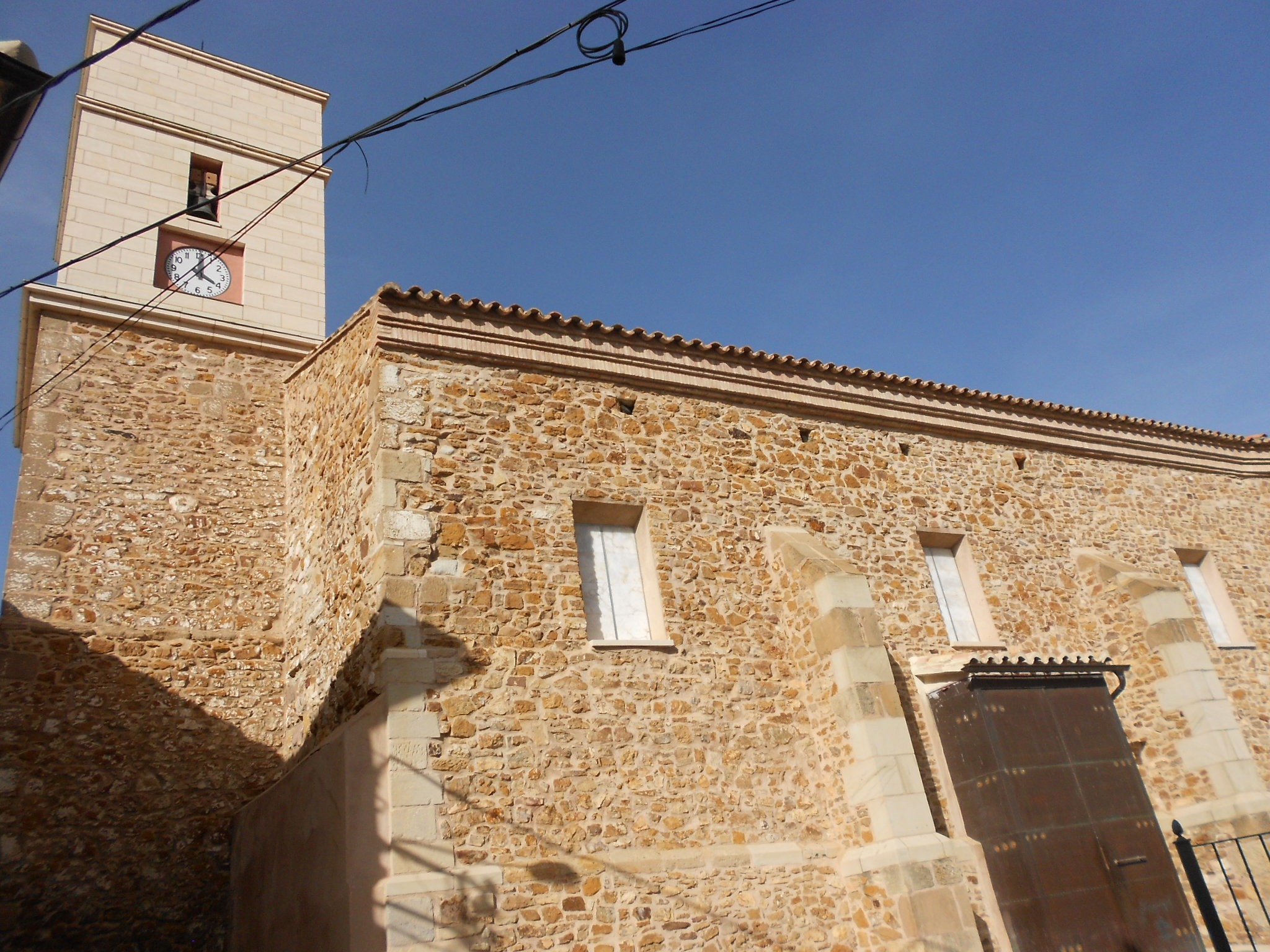 Iglesia parroquial de San Juan Bautista (Escucha, España)